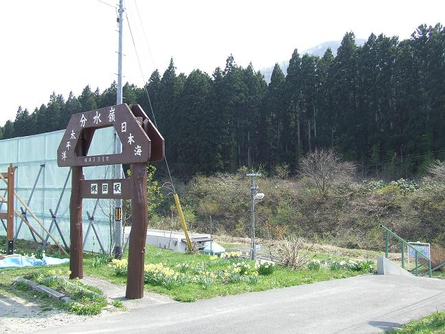 JR堺田駅分水嶺標識